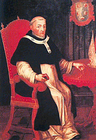 Fray Jerónimo de Loayza (1498-1575)